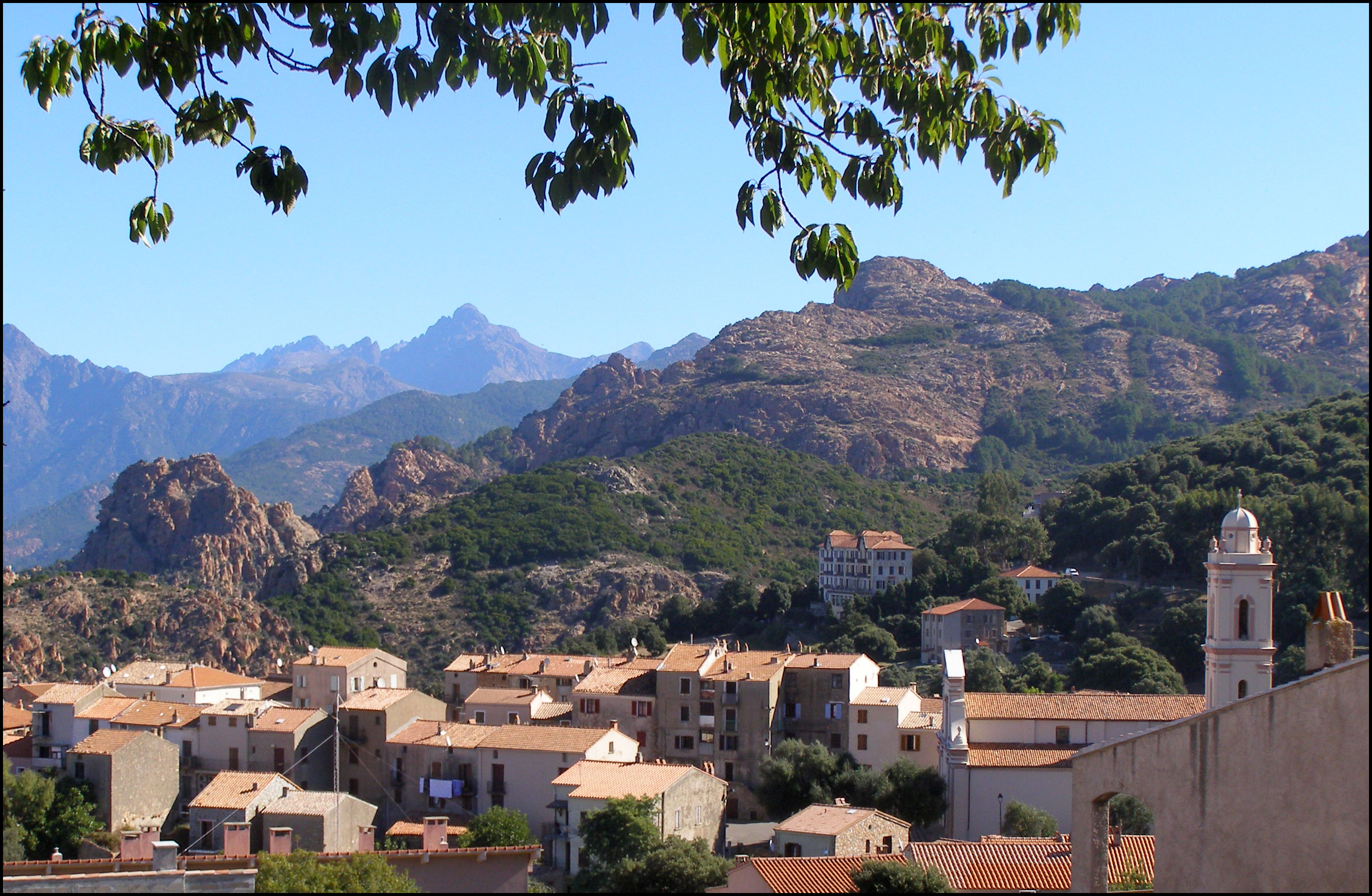 Village de Piana (Corse)